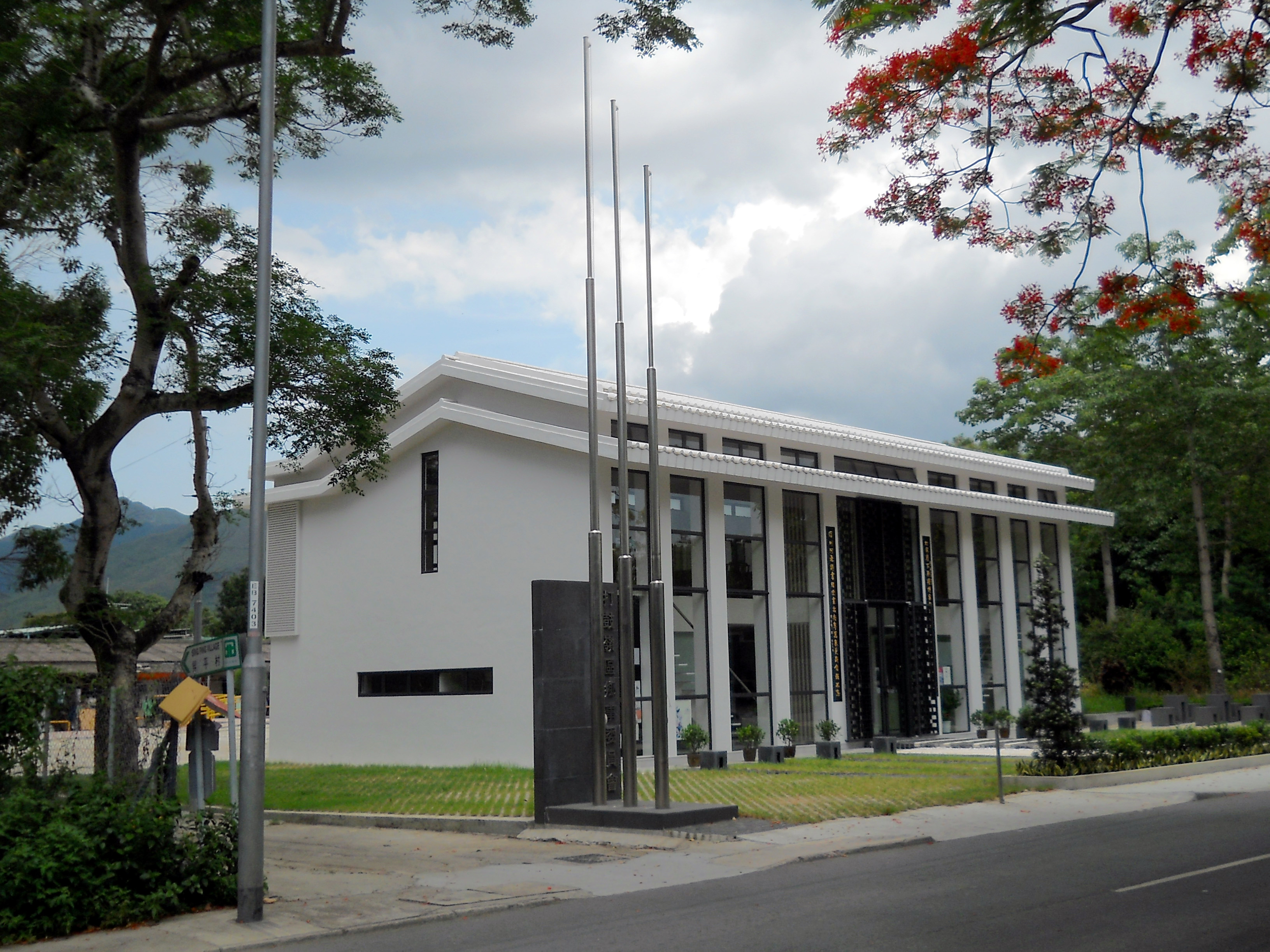 中文（香港）: 打鼓嶺區鄉事委員會